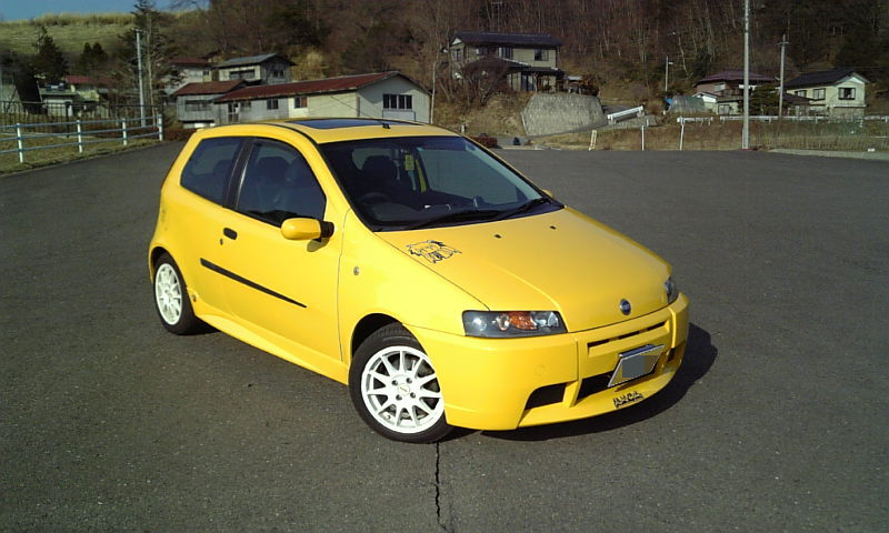 Fiat Punto HGT Abarth (Japan)